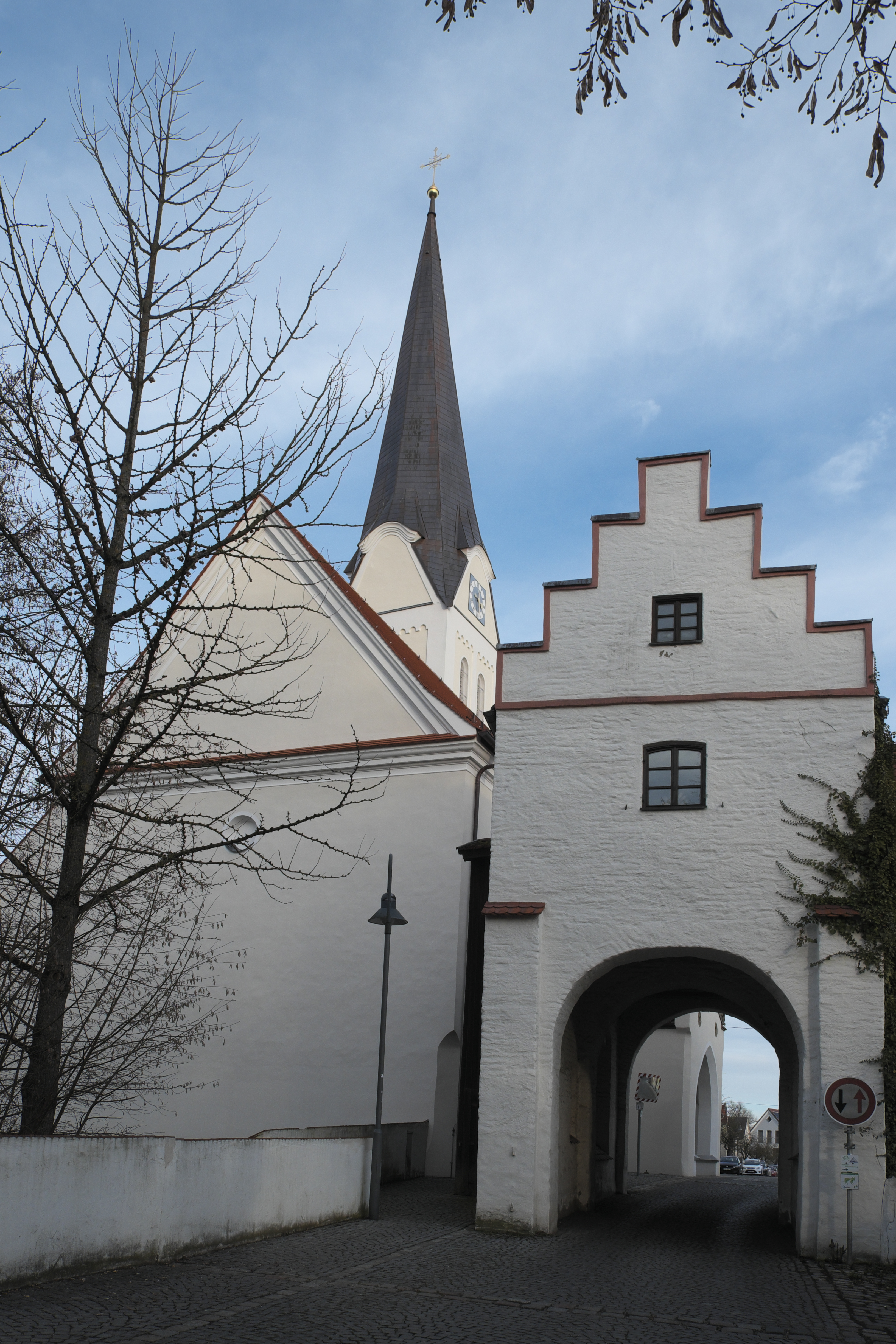 Markttor in Hohenwart im oberbayerischen Landkreis Pfaffenhofen an der Ilm (Bayern/Deutschland)